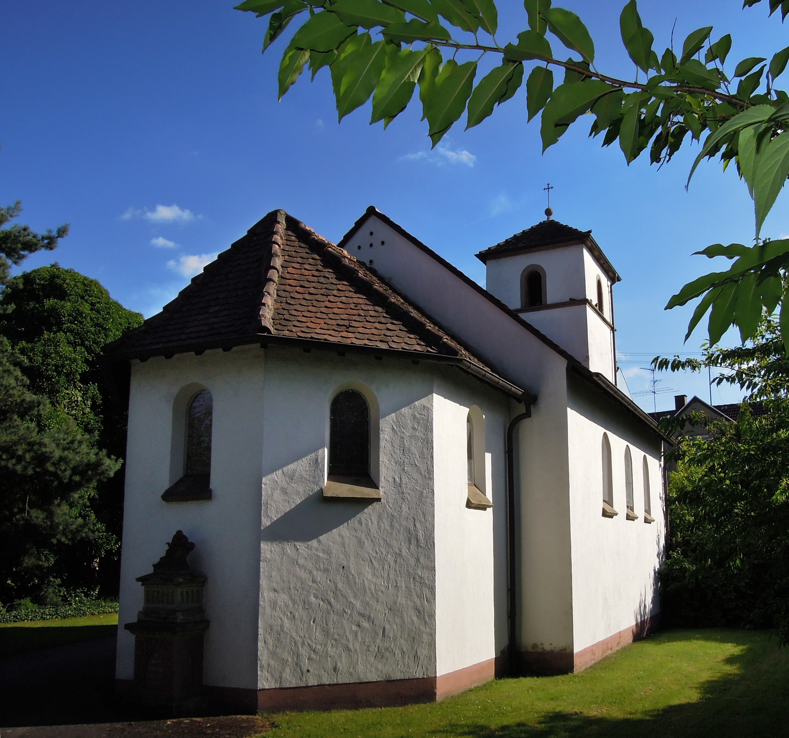 St. Apollonia Rodener Straße, Friedhofskapelle St. Apollonia vor 1870 (Einzeldenkmal)